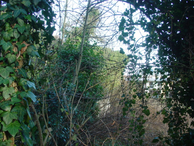 Beguinage Ter Hoyen, Ghent (Belgium)